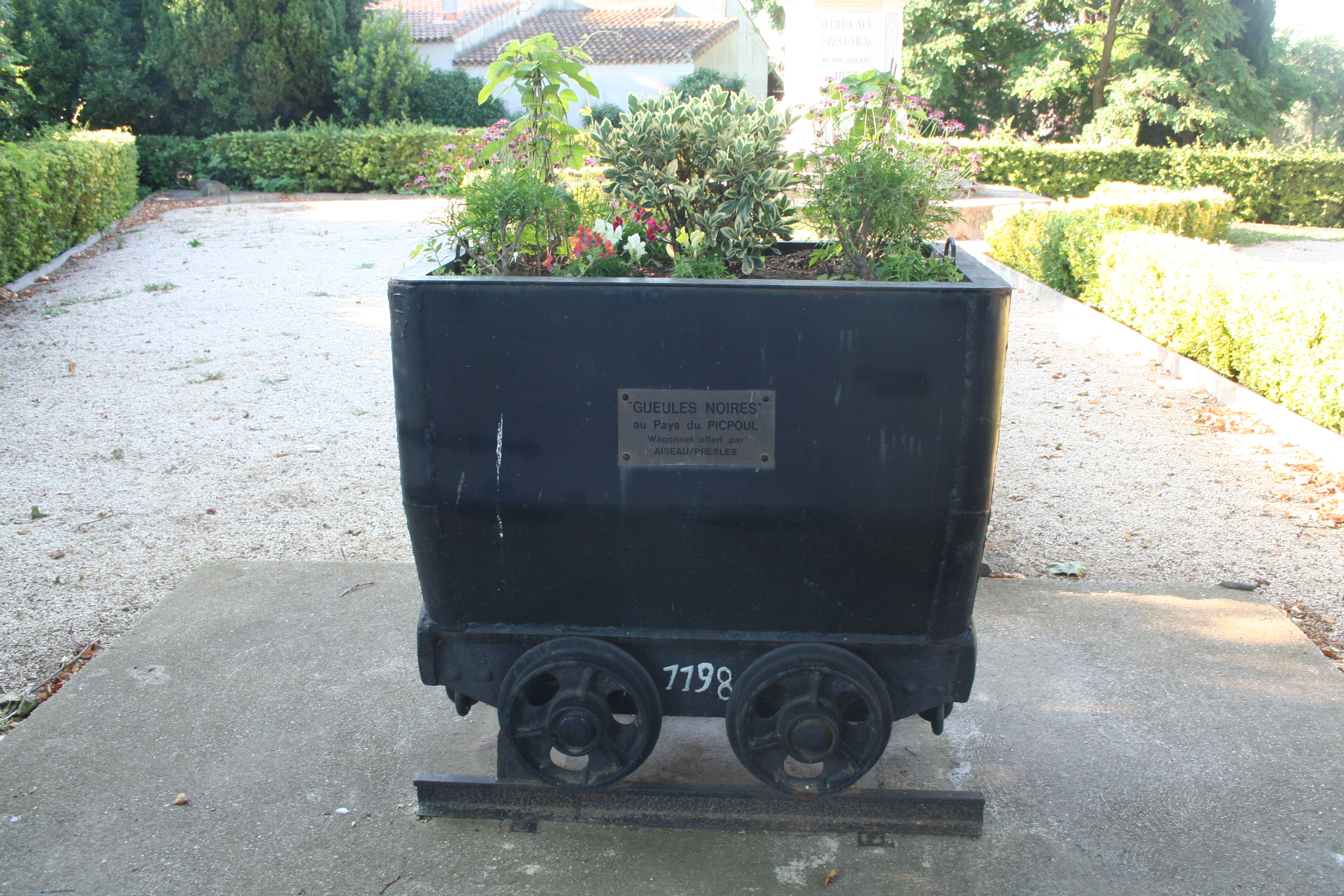 Pomérols (Hérault) - wagonnet de mine offert par la ville jumelle d'Aiseau-Presles, et transformé en corbeille à fleurs.